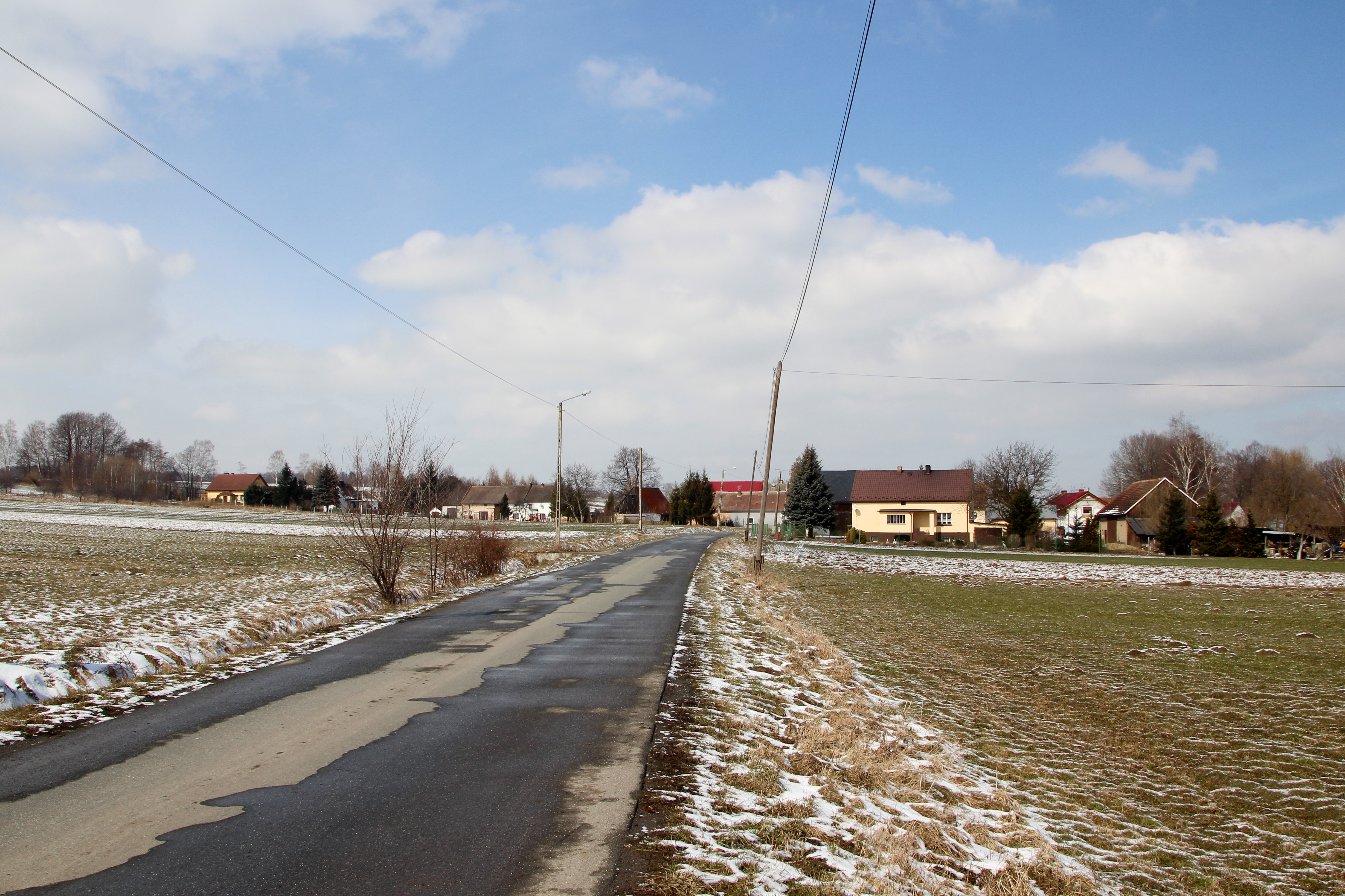 Wilamowice Nyskie – wieś w Polsce, w województwie opolskim, w powiecie nyskim, w gminie Głuchołazy.